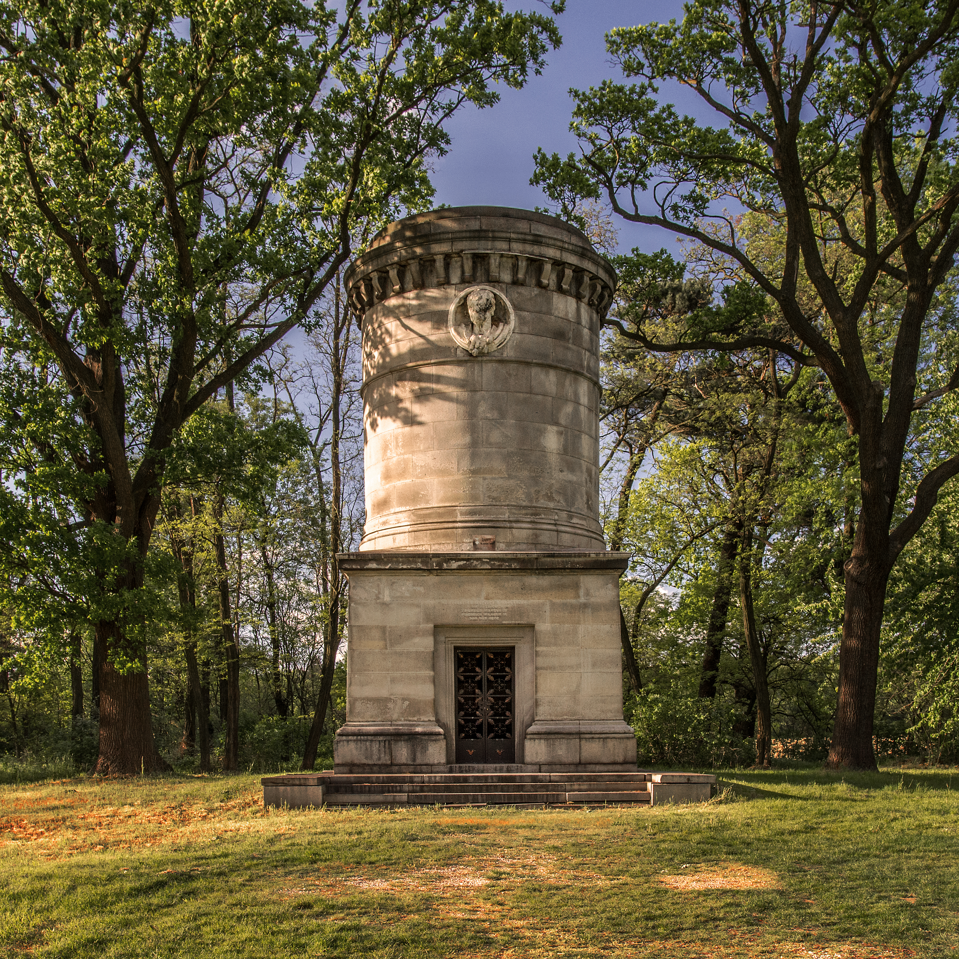 Krobielowice, mauzoleum marszałka G.L. Blüchera (przy drodze z Krobielowic do Kątów), 1846-1853